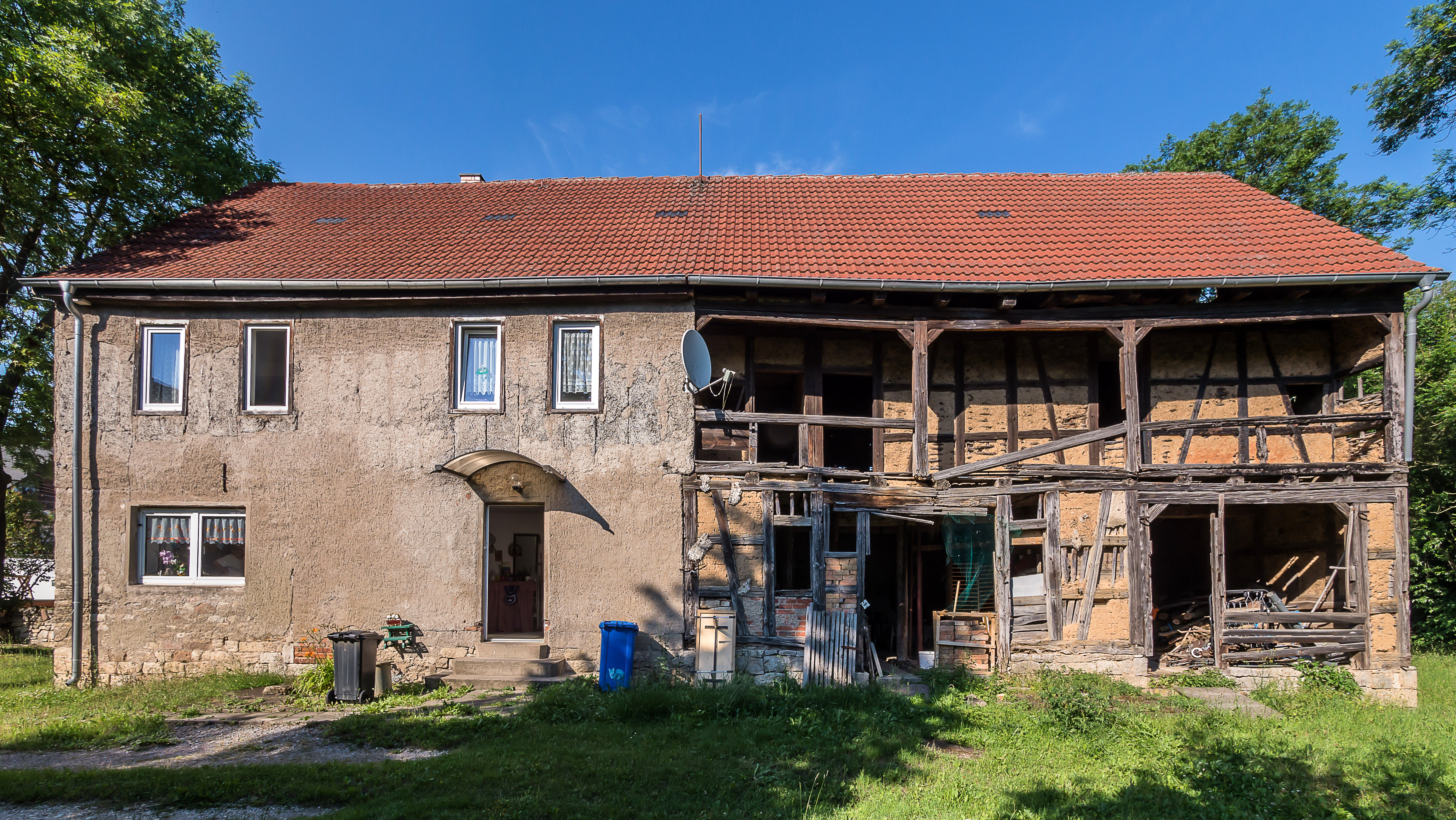 Hetschburg Haus Nr. 19a ehem. Wirtschaftsgebäude